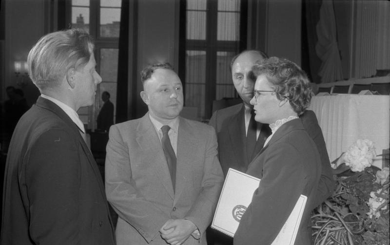 Gründung des Deutschen Turn- und Sportbundes Zentralbild/Beyer 27.4.1957 Gründungskonferenz des Deutschen Turn- und Sportbundes Am 27. und 28.4.1957 fand im Haus der Ministerien in Berlin die Gründungskonferenz des Deutschen Turn- und Sportbundes statt. Ungefähr 400 gewählte Delegierte aus den Reihen unserer Sportler traten zusammen , um den Deutschen Turn- und Sportbund zu gründen. Mit der Gründung des DTSB beginnt eine neue Etappe unserer demokratischen Sportbewegung, die auf den bisherigen großen Erfolgen aufbaut. UBz.: Während einer Konferenzpause unterhalten sich (v.l.n.r.): Heinz Birkemeyer, der 1. Vorsitzende der SV Dynamo, Erich Mielke, Helmut Behrendt(halbverdeckt) und die Verdiente Meisterin des Sports Gisela Köhler. Abgebildete Personen: Mielke, Erich: Minister für Staatssicherheit, Armeegeneral, Politbüro des Zentralkomitees (ZK) der SED, DDR (GND 118977490) Birkemeyer, Heinz: Leichtathletiktrainer, DDR Birkemeyer, Gisela: Hürdenläuferin, DDR